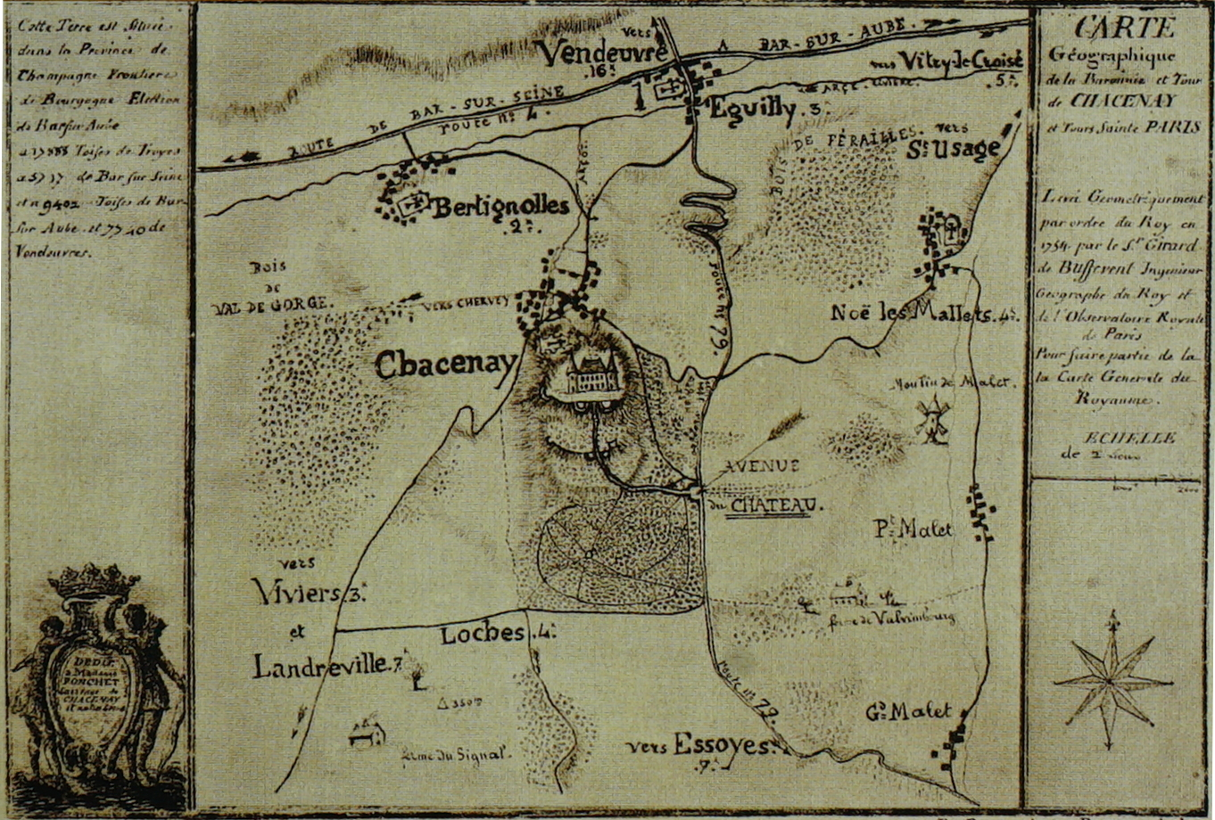 plan de Chacenay chateau et Vendeuvre